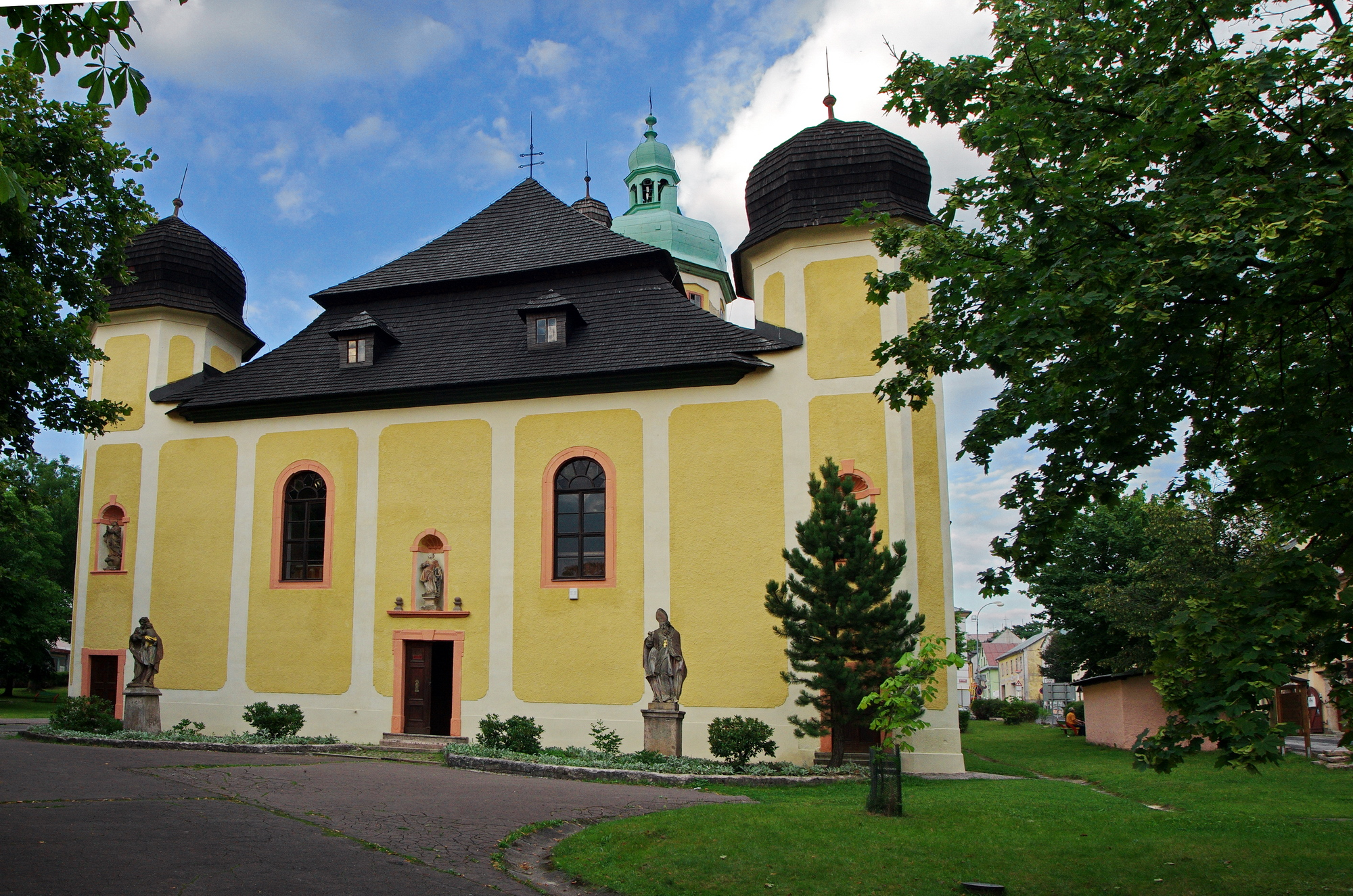 Kostel svatého Vavřince, Nám. Sv. Vavřince, Horní Blatná, Horní Blatná.